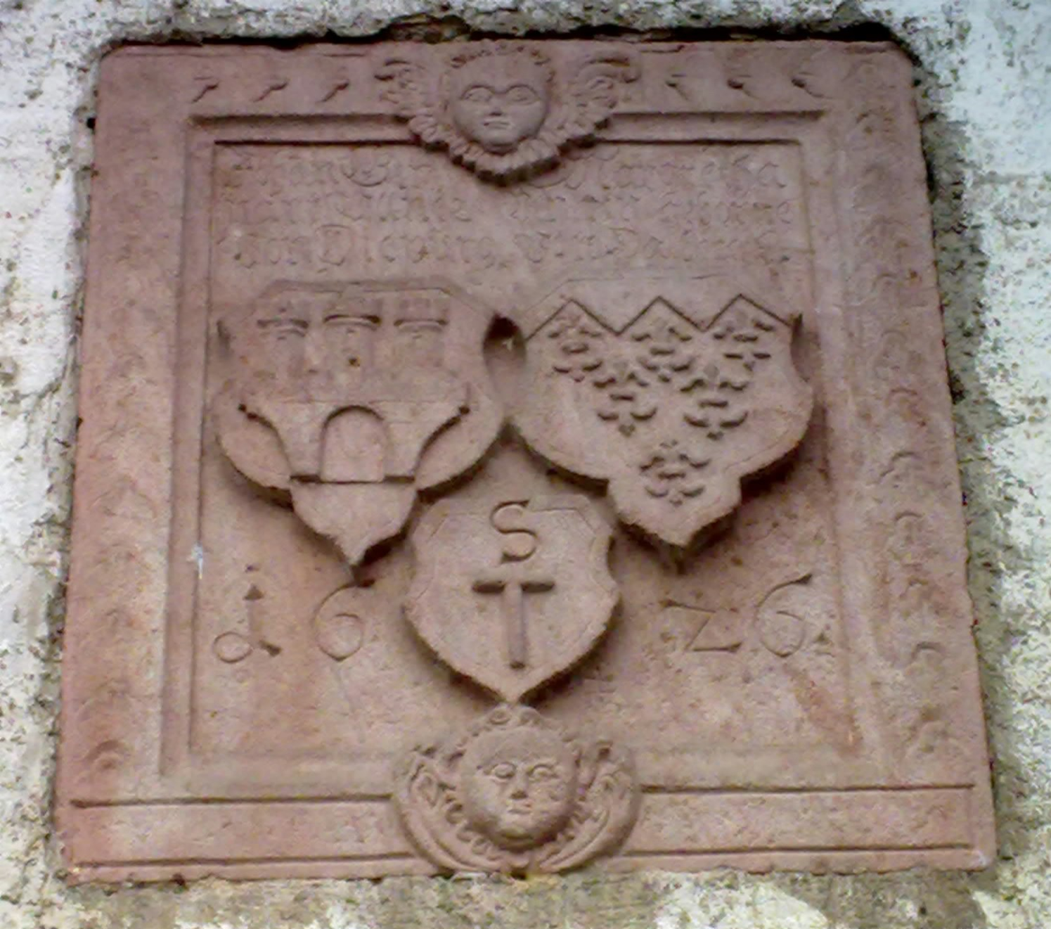 Das Doppelwappen der Ulner von Dieburg mit der dreizinnigen Burg und der von Dalberg mit den sechs Lilien, datiert 1626, am Weinheimer Schloss